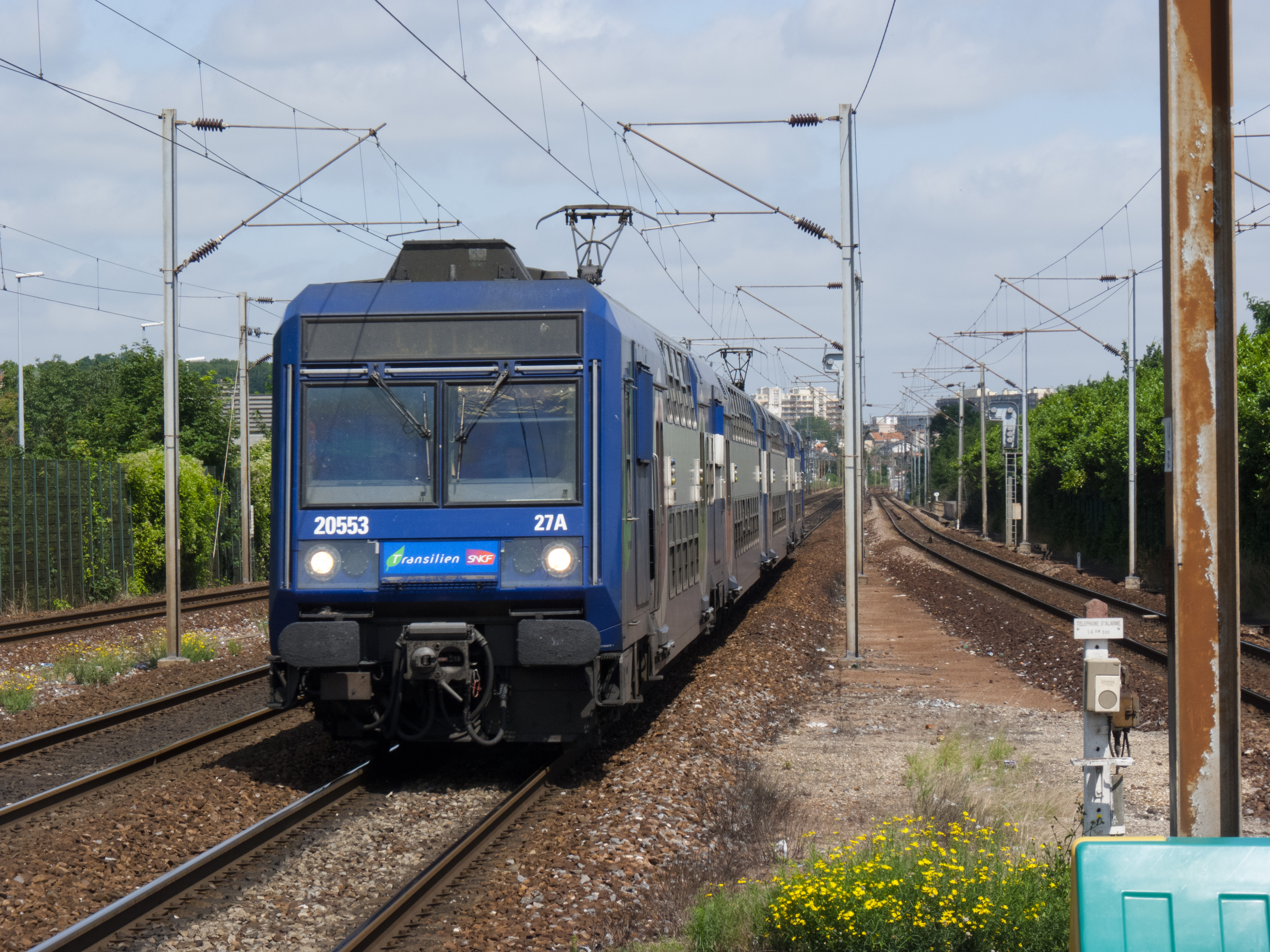 La Z 20553-54 à Val de Fontenay pour une mission CITU en direction de Coulommiers.